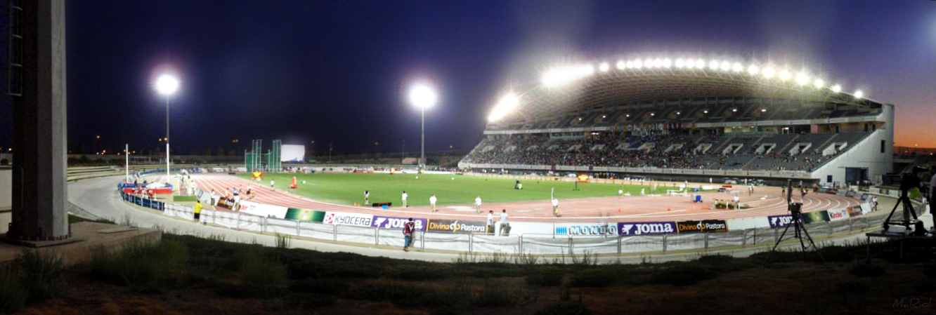 Estadio de Atletismo durante el 91º Campeonato de España Absoluto de Atletismo